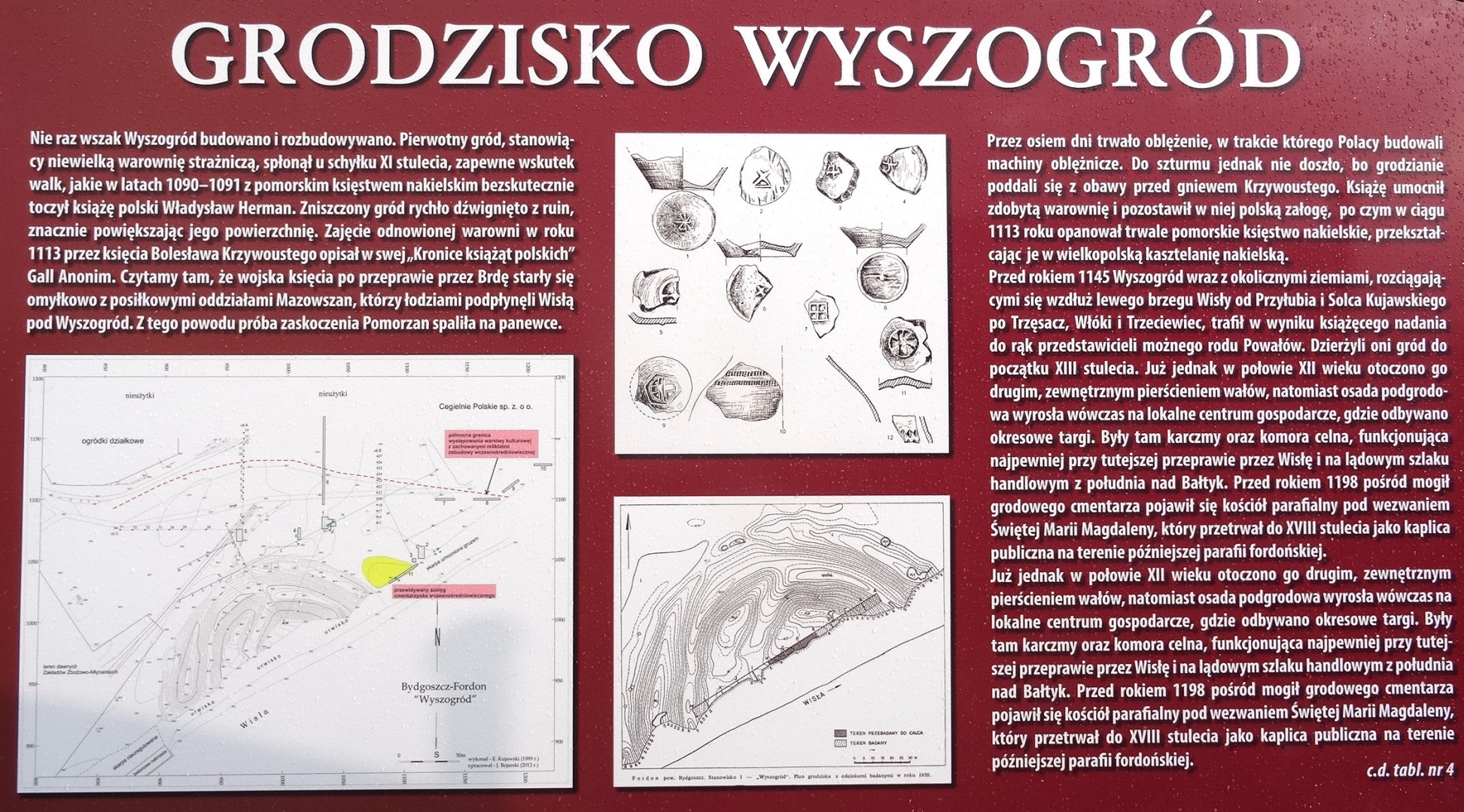 Tablice informacyjne na grodzisku Wyszogród (XI w.) w Bydgoszczy, ustawione w 2015 roku